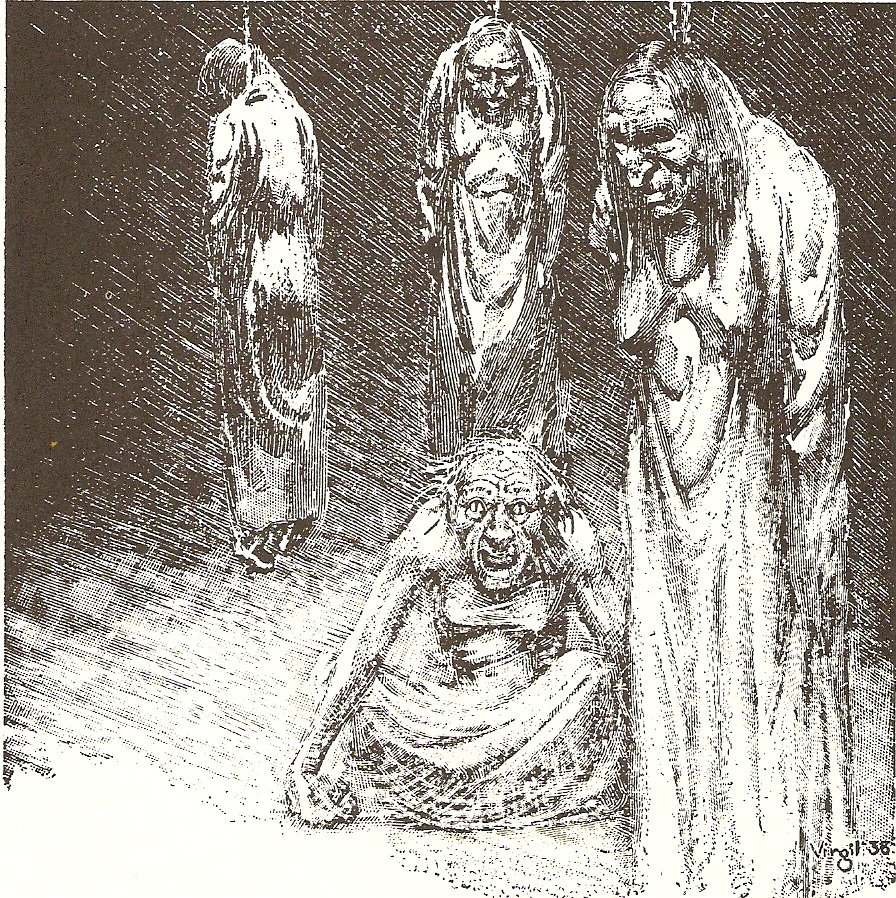 Иллюстрация рассказа Роберта Говарда "Голуби из ада" 1938 год